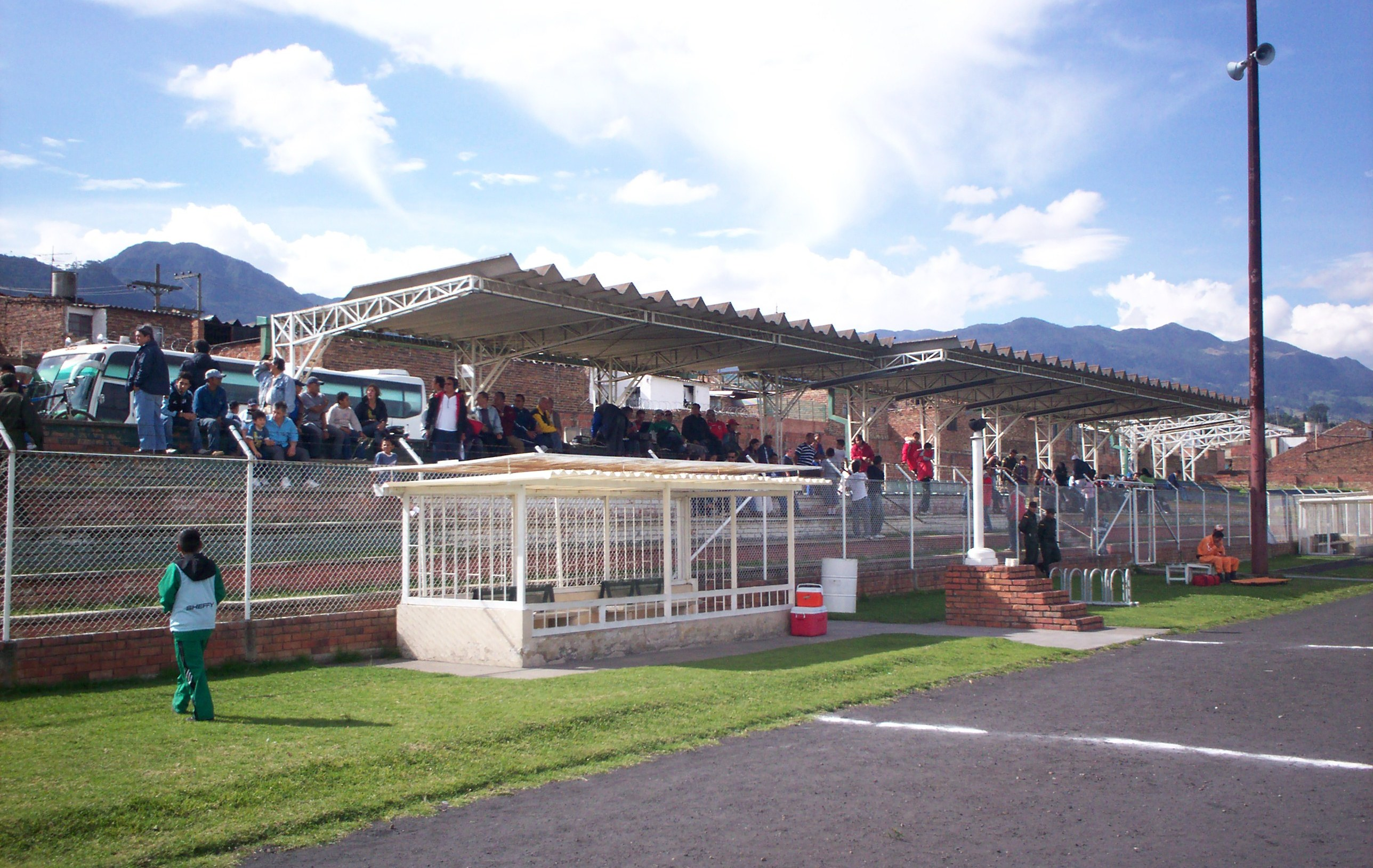 Estadio Municipal Los Zipas